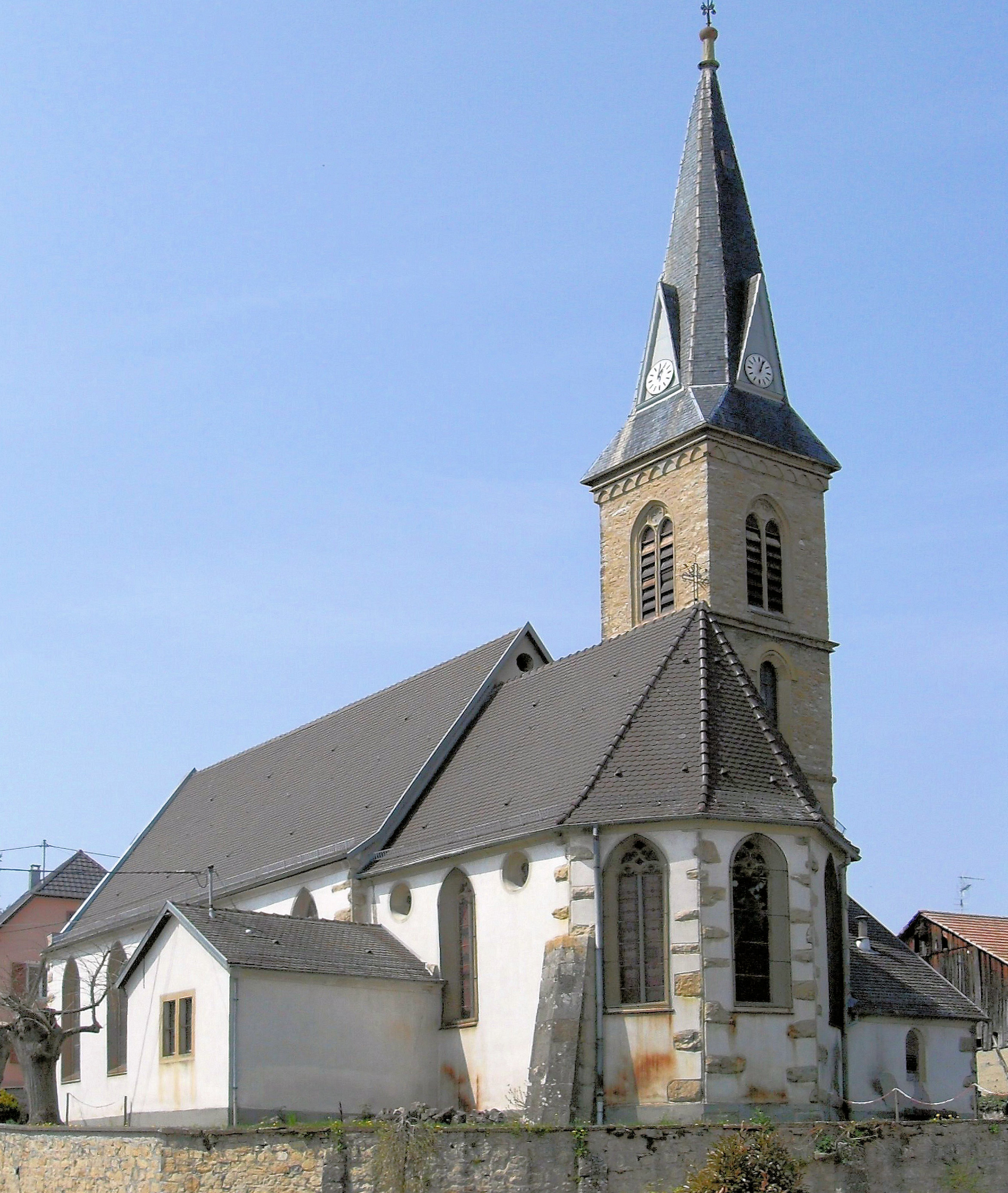 L'église Saint-Michel à Magstatt-le-Bas